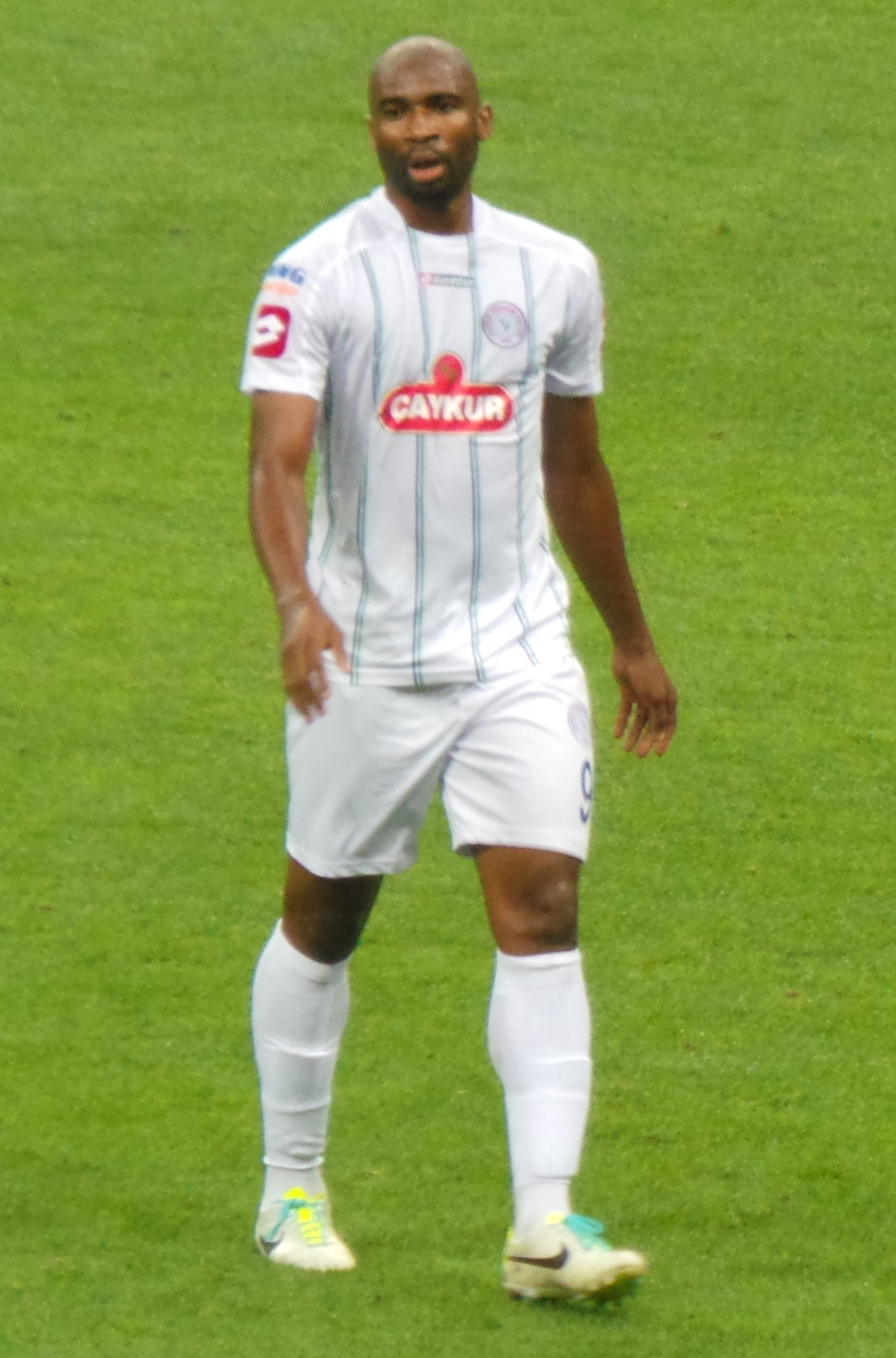 Léonard Kweuke